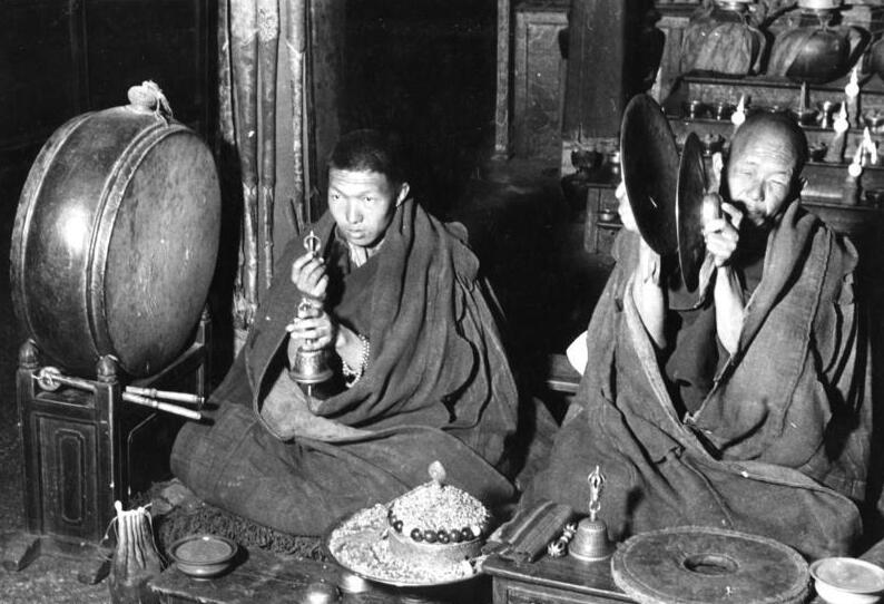 Lhasa, in und um den Stadttempel